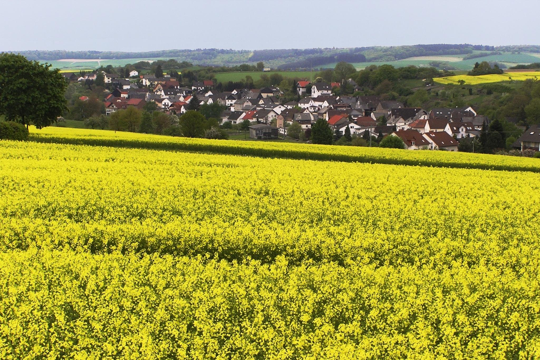 Hundstadt zur Zeit der Rapsblüte